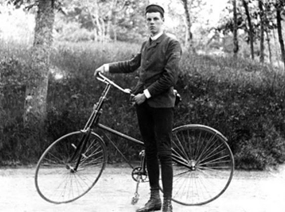 Axel Odelberg med cykel 1889